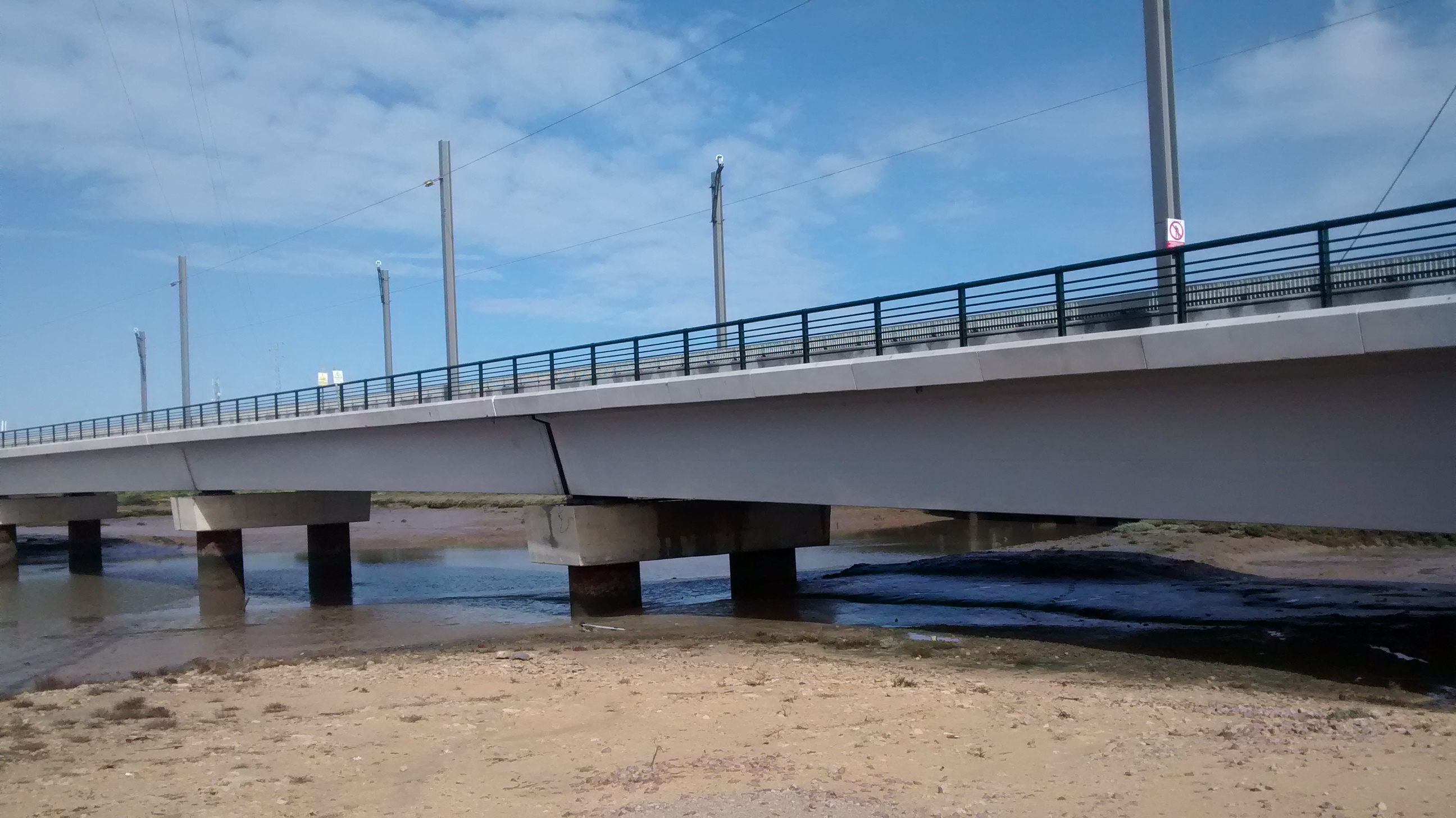 Puente del tranvia sobre el río Zurraque entre San Fernando y Chiclana